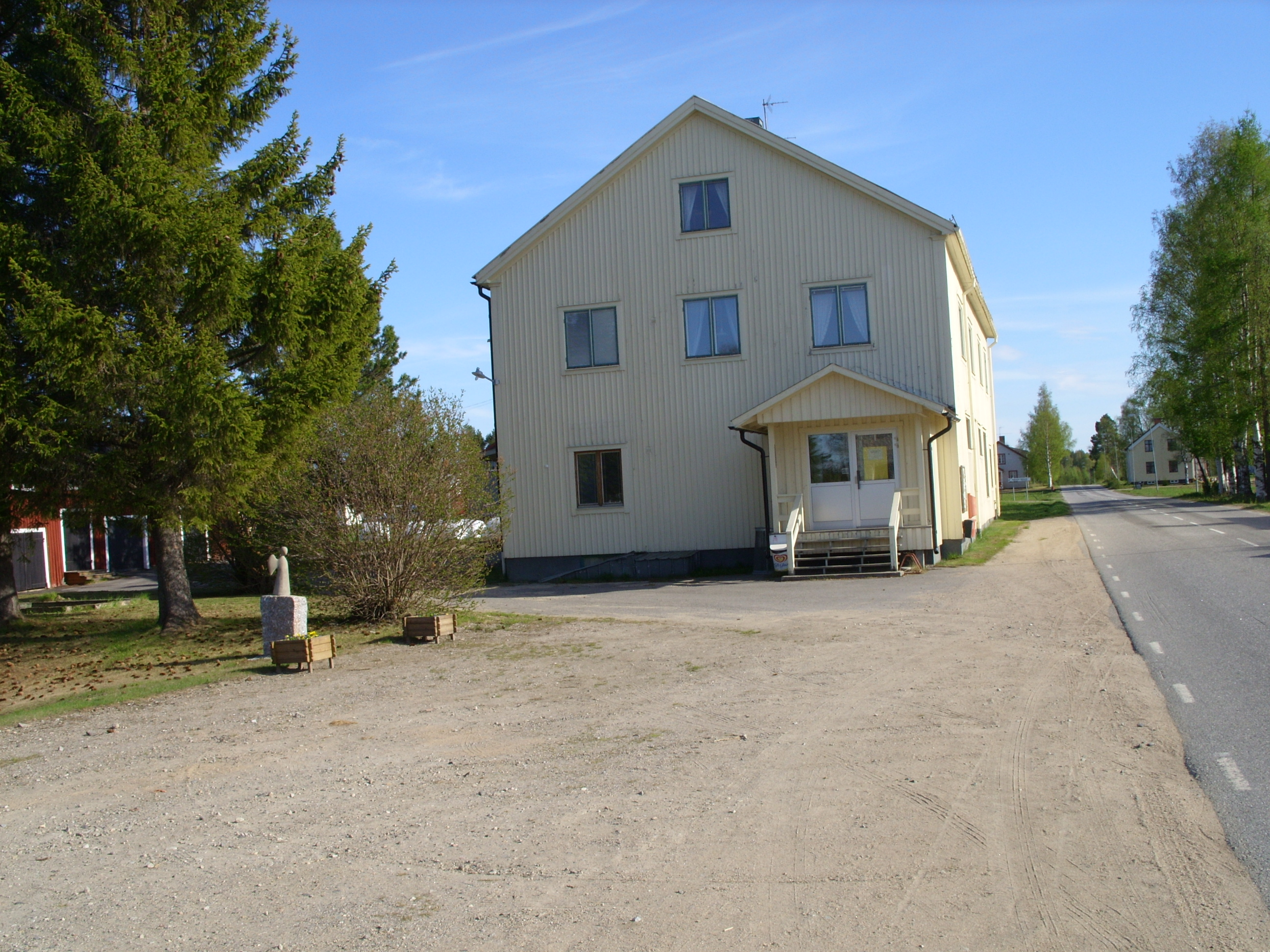 Kulturhuset Åmsele entré med Unitehope-ängeln utanför